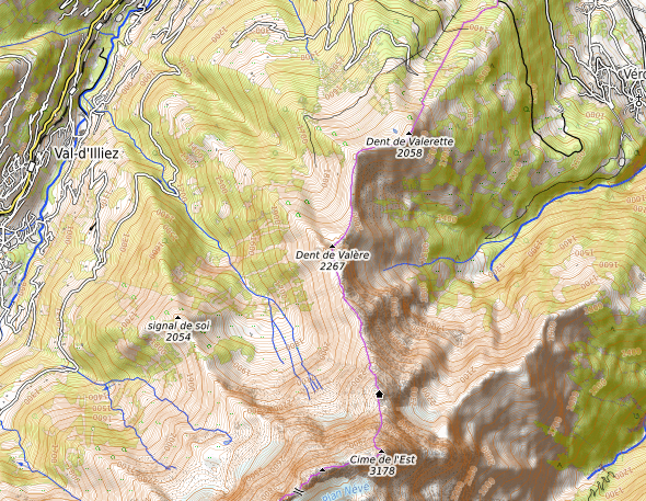 carte réalisée sur umap This map may be incomplete, and may contain errors. Don't rely solely on it for navigation.